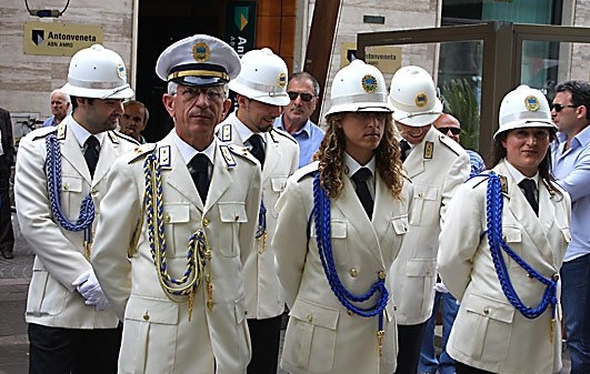 Polizia municipale di Cosenza